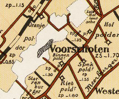 Binnenpolder